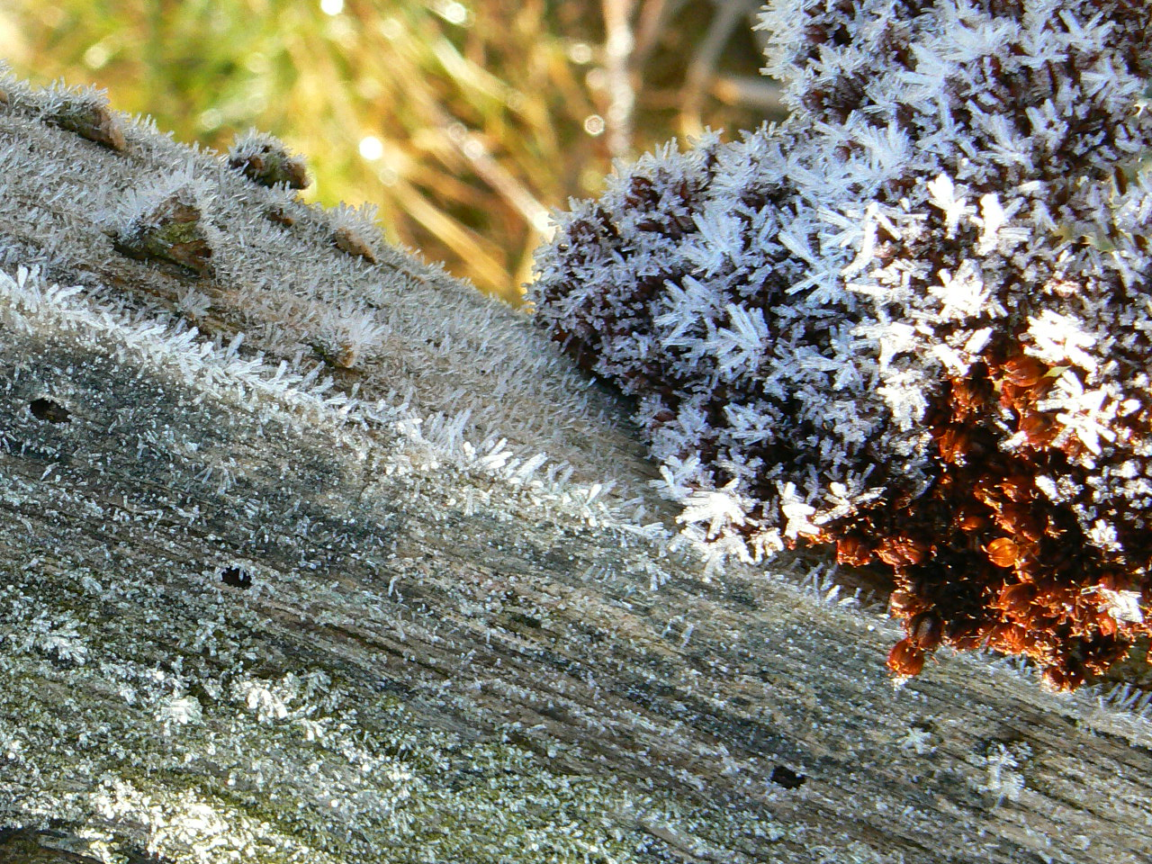 Reif auf einem Weidezaun